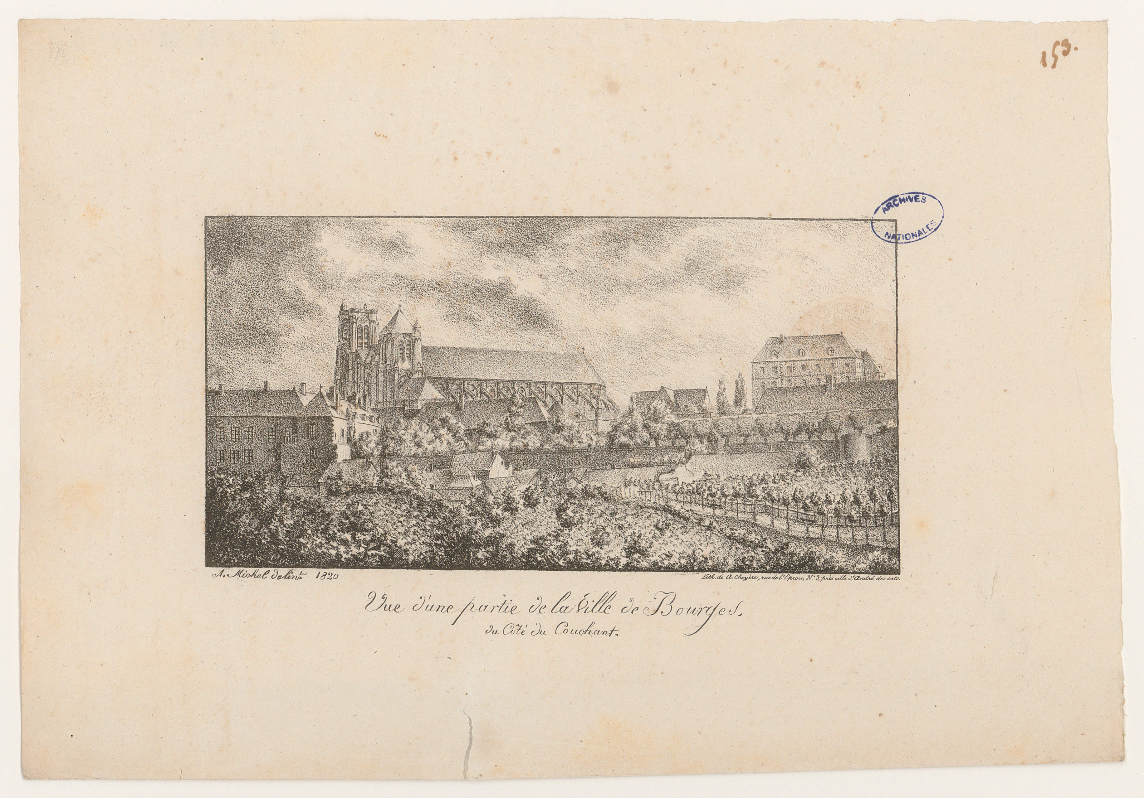 Vue d'une partie de la ville de Bourges. Plan issu des dossiers de travaux de restauration des cathédrales (1802-1912), conservés aux Archives nationales (inventaire et autres documents numérisés consultables en ligne).